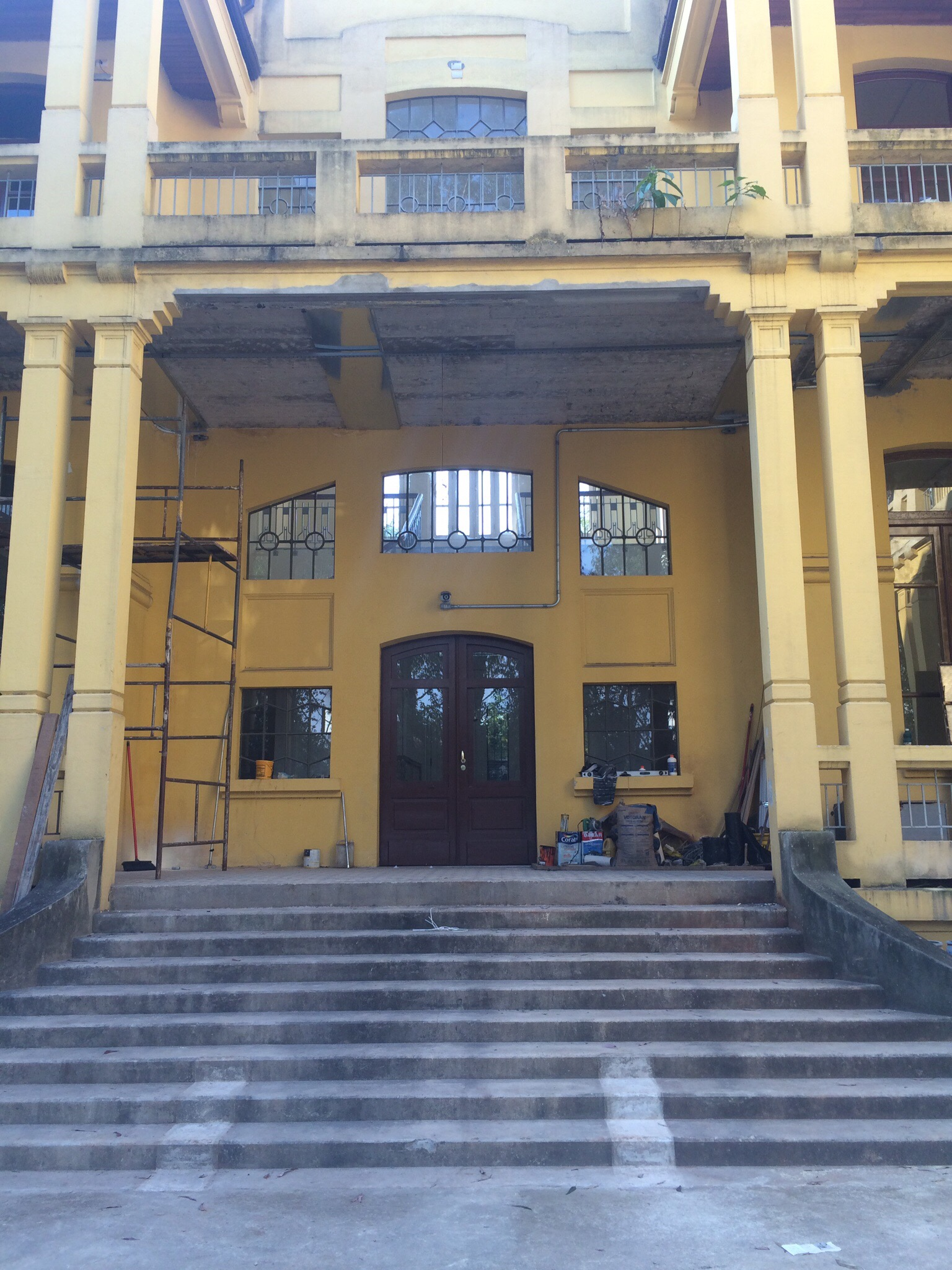 Porta dos fundos e acesso ao pátio da EEPG Campos Sales